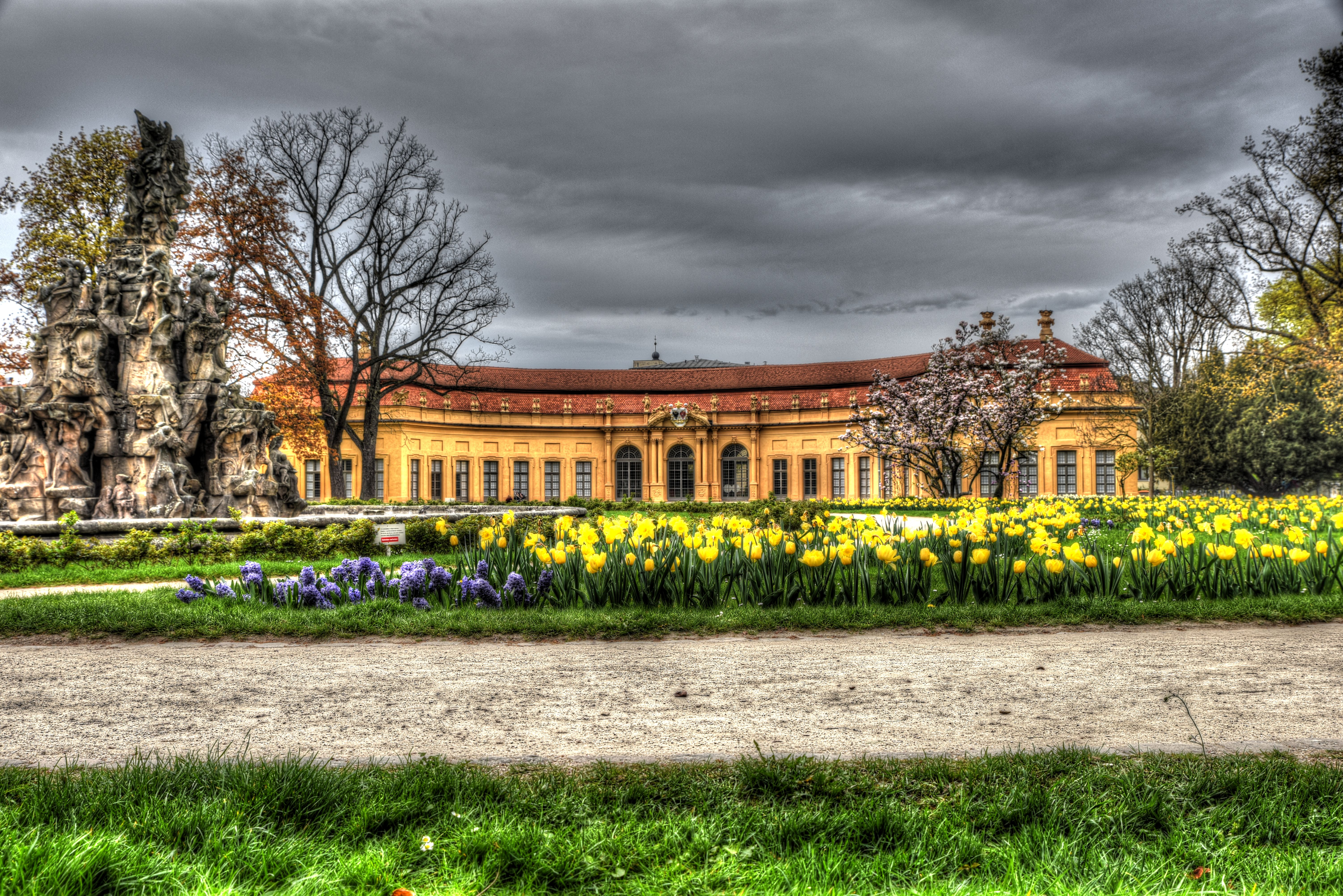 Stadtpark Erlangen Orangerie